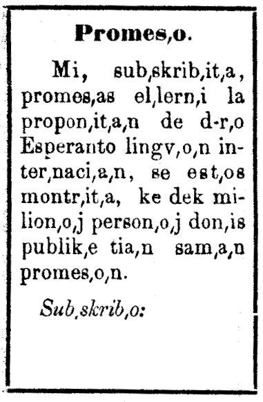 Karto el la Unua Libro, kun la promeso lerni Esperanton